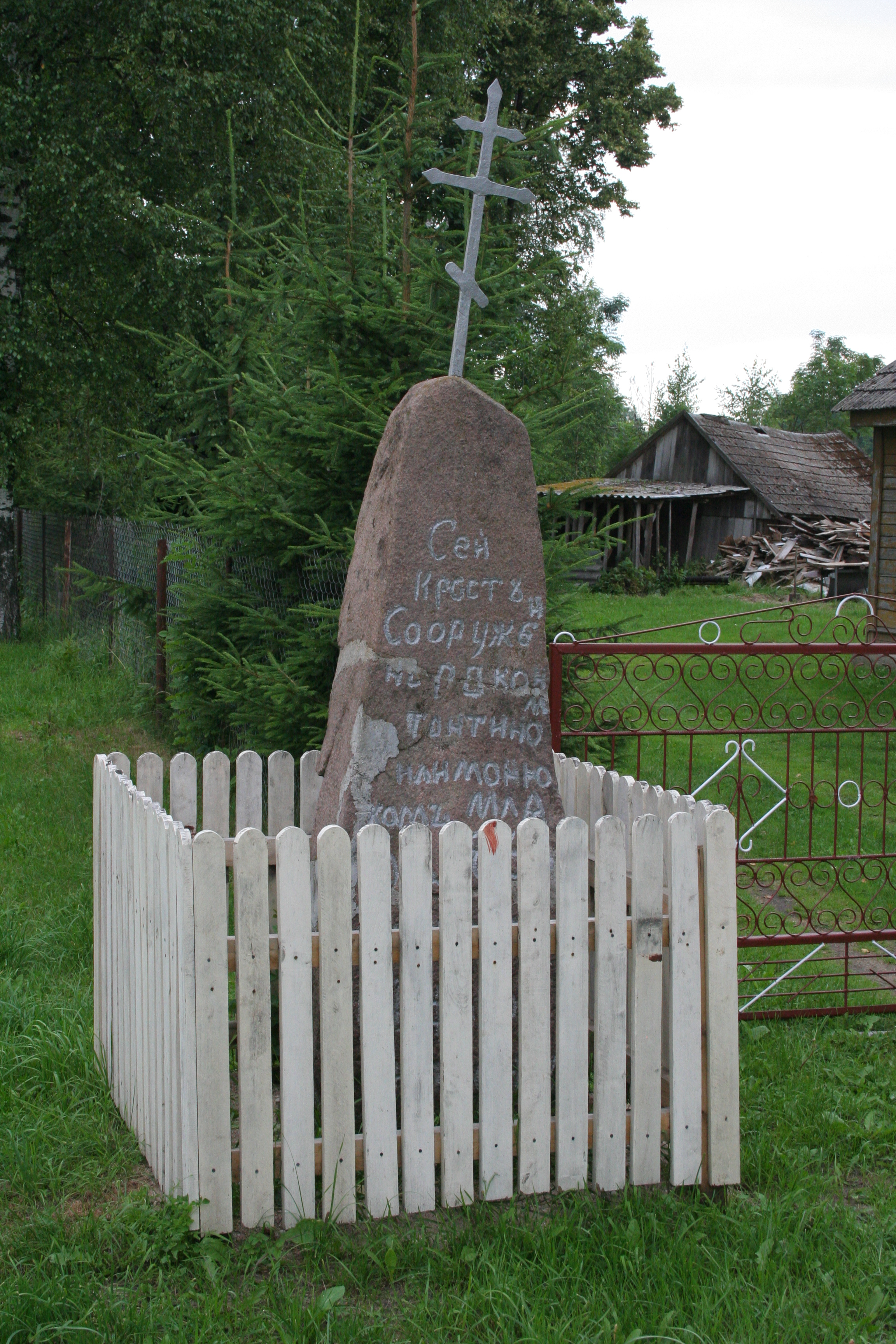 Krzyż przydrożny w Tyniewiczach Małych.